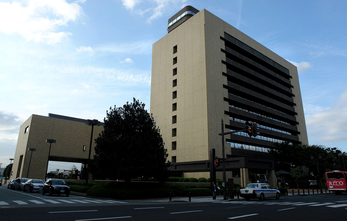 山形市役所庁舎